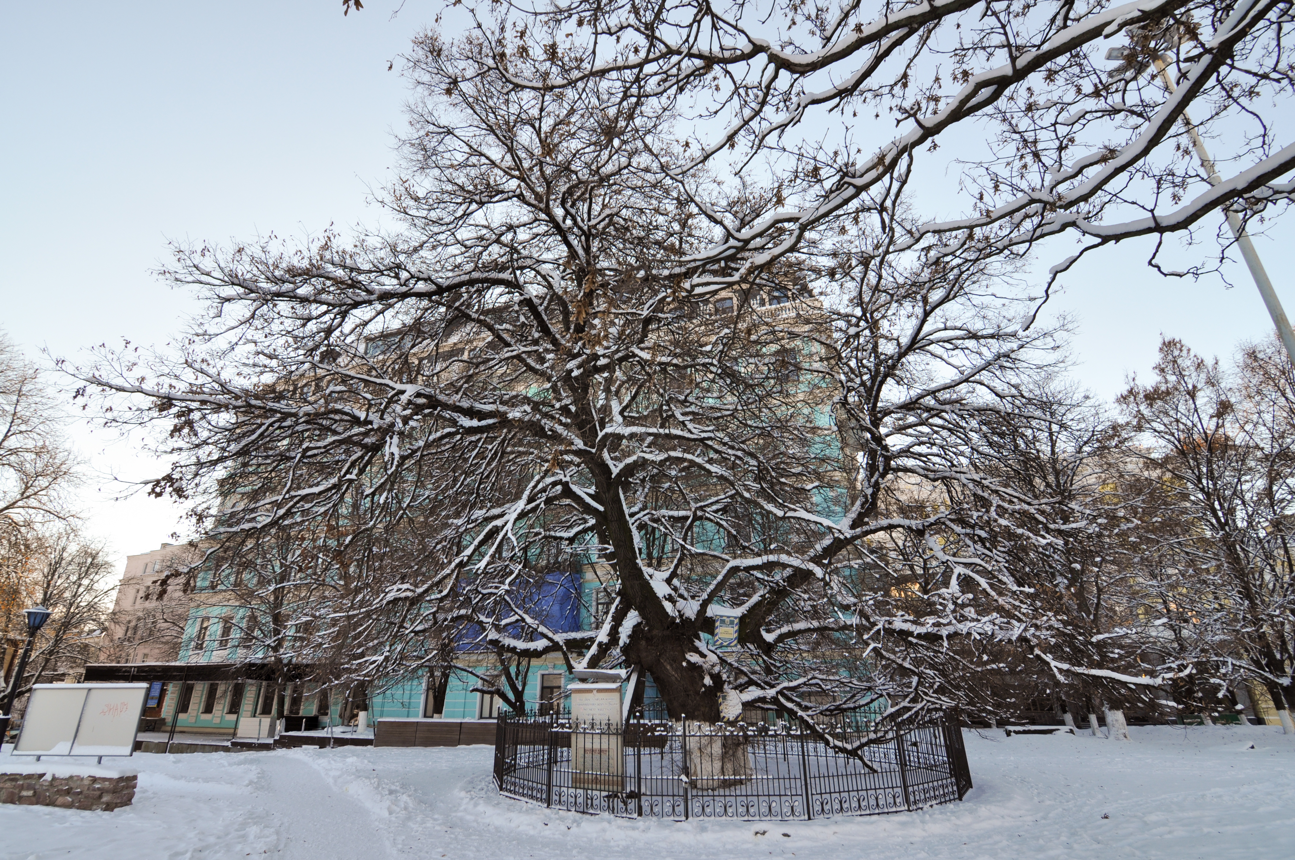 Липа Петра Могили, Шевченківський район вул. Володимирська